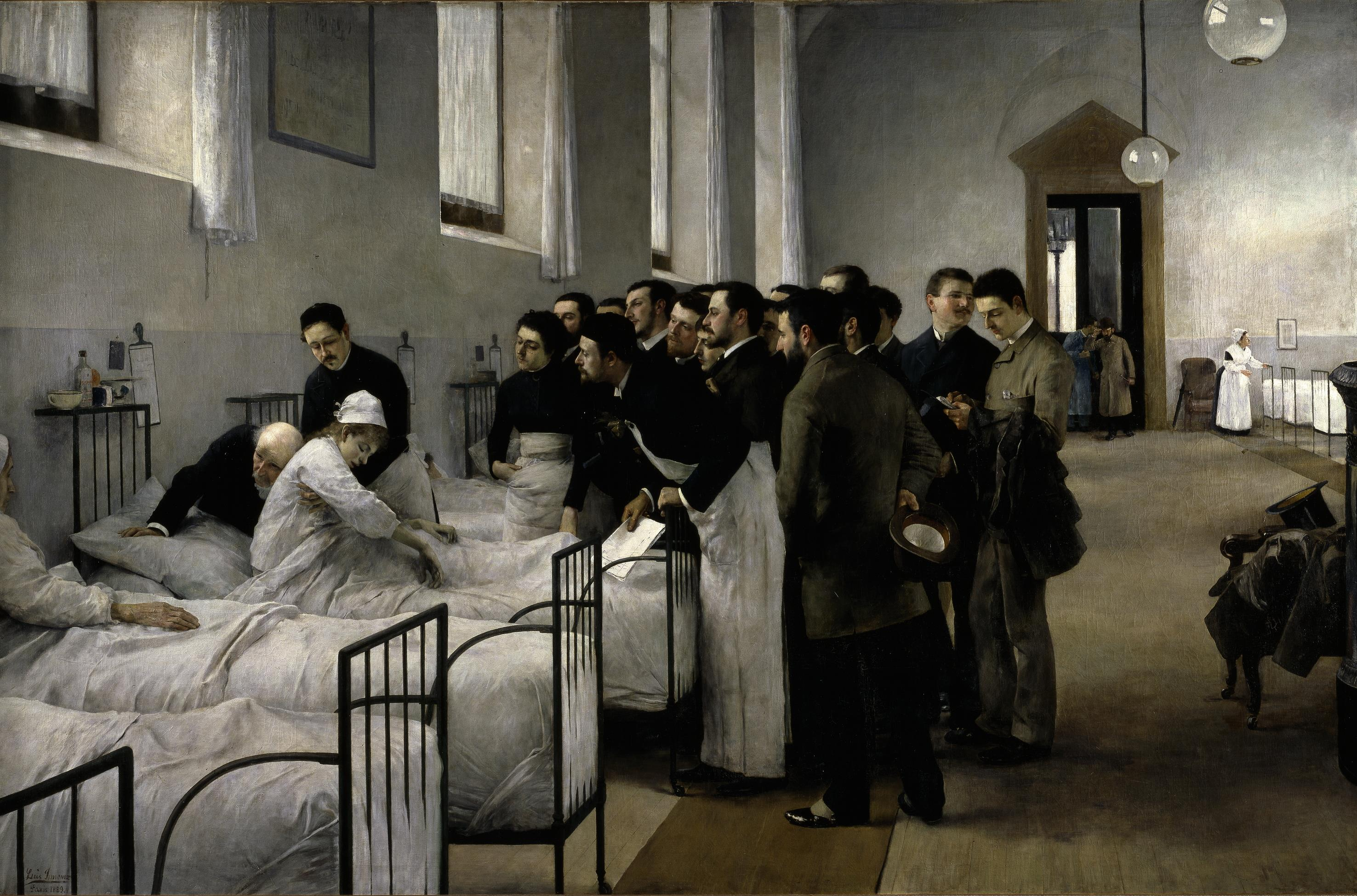 La sala del hospital en la visita del médico en jefe, óleo sobre lienzo, 290 x 445 cm, 1889. (Museo de Bellas Artes de Sevilla) Primera medalla en la exposición internacional de 1892.